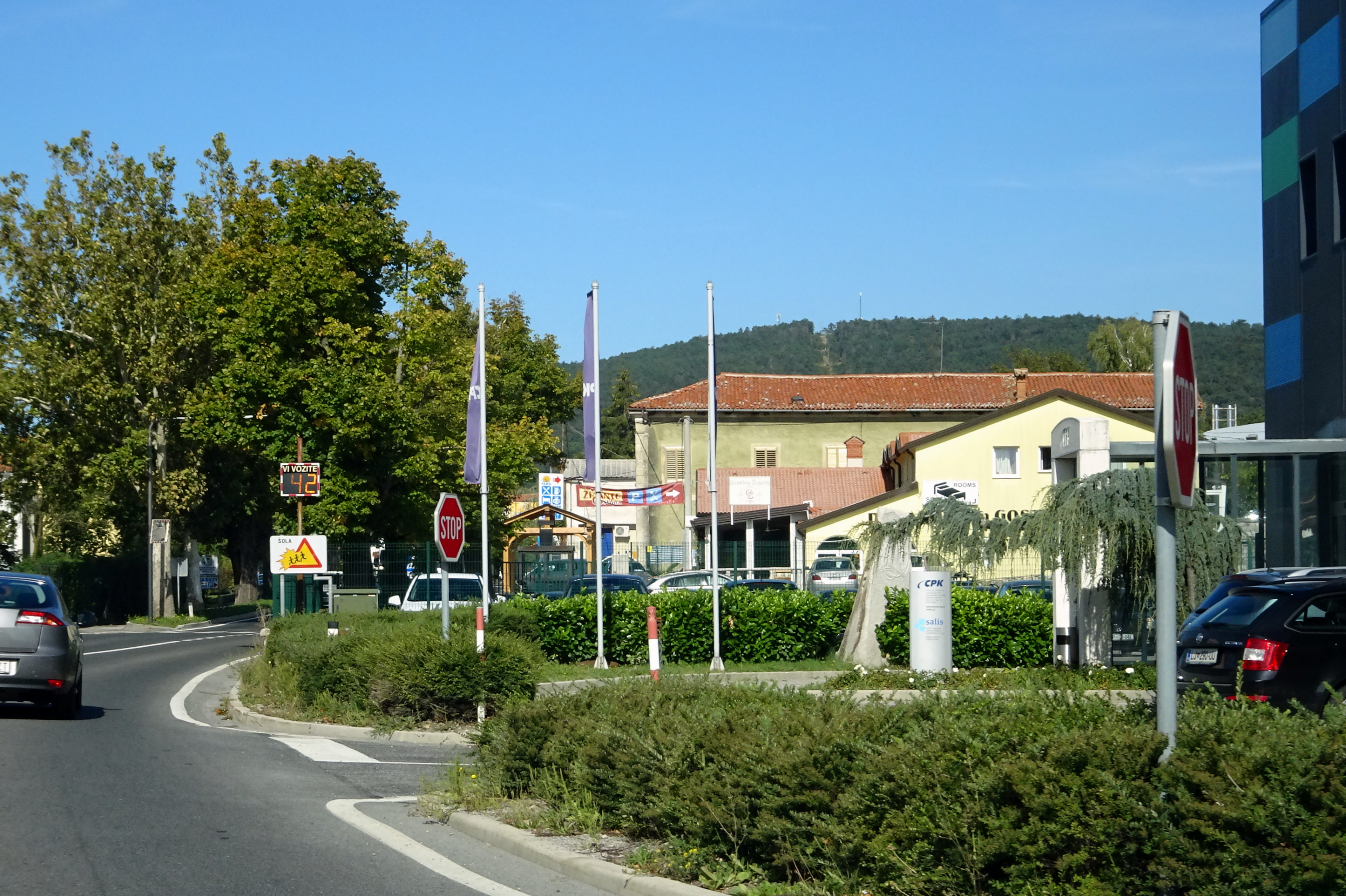 Hrpelje, Municipality of Hrpelje-Kozina, Slovenia